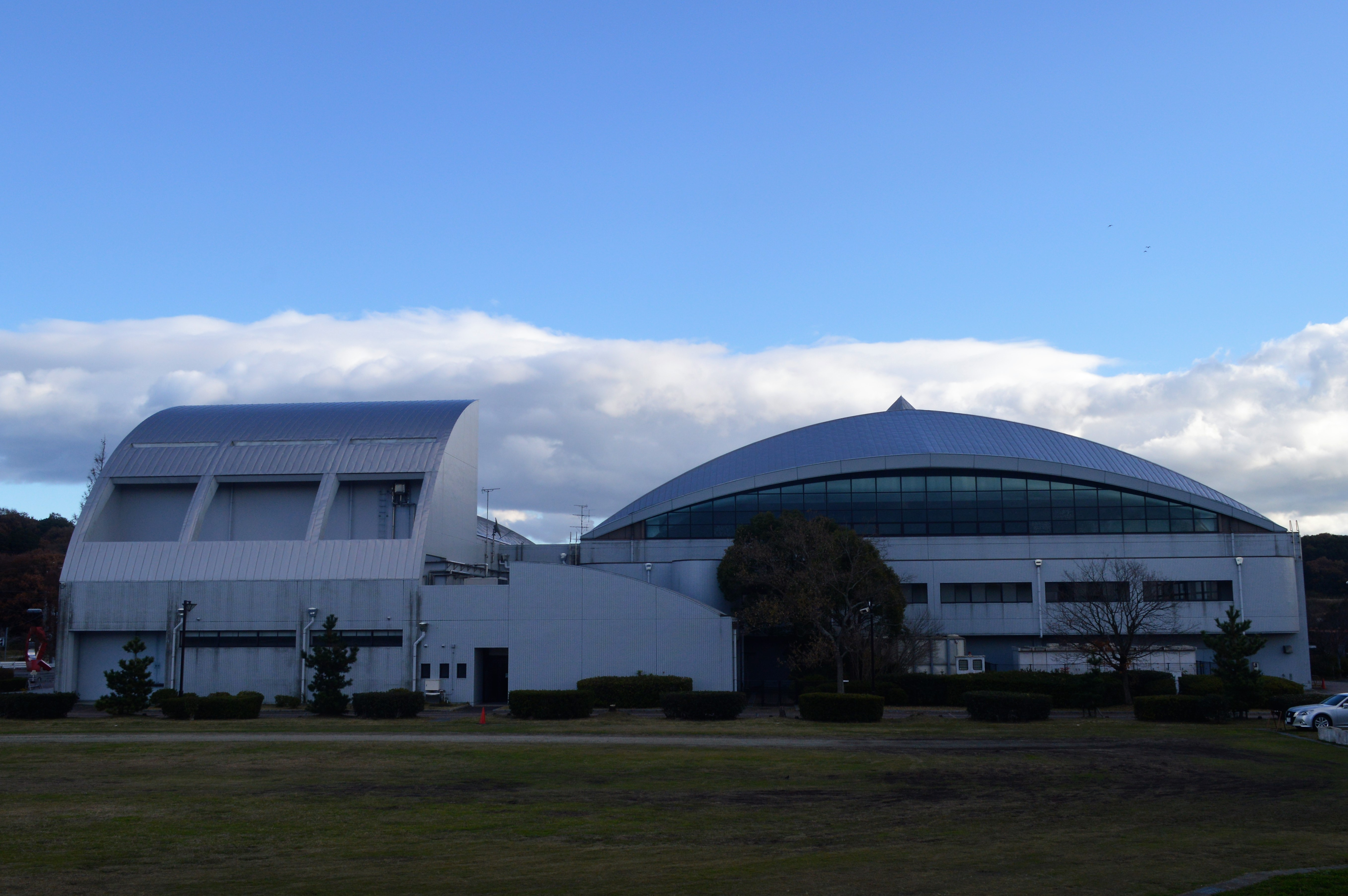 愛知県知多郡美浜町の美浜町総合公園体育館。